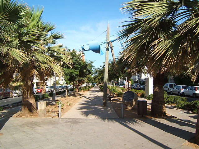 Shderot Nordau (Nordau Boulevard) in Tel Aviv